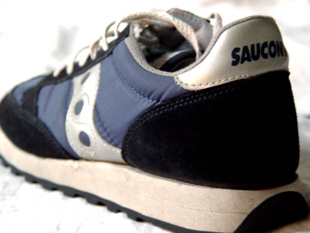 Sauconys